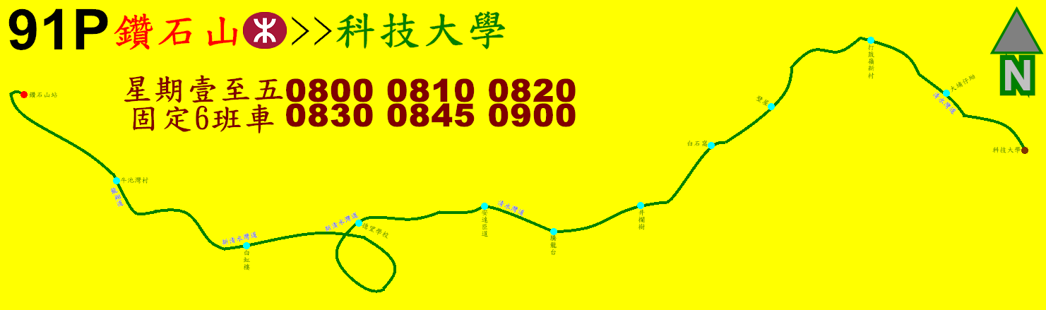 中文（香港）: 九巴91P線(科大方向)的走線圖